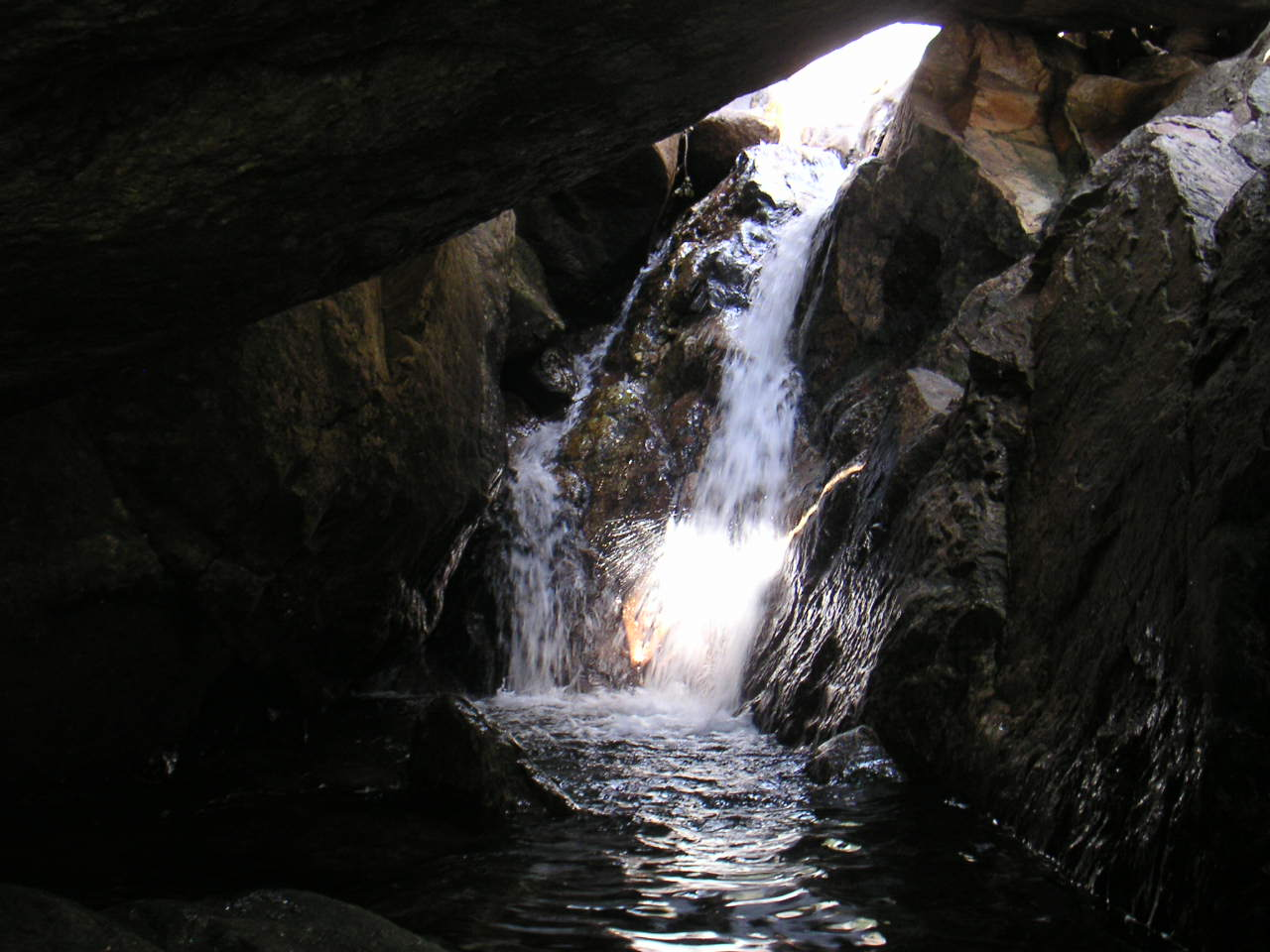 Gorges de Colombières - Cascade sous rochers Photo Personnelle - TouN Prise en août 2004